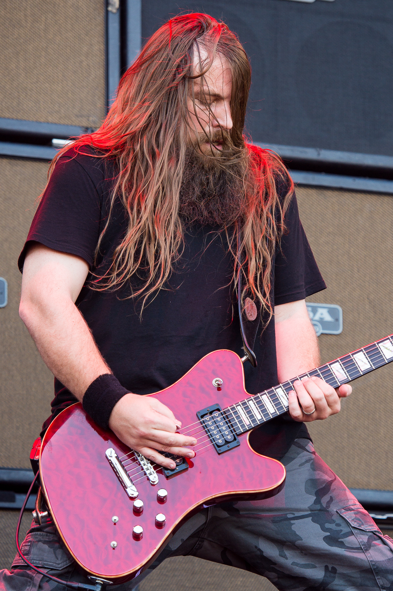 ARGO-Konzerte,Beck's Park Stage,Festival,Konzert,Lamb of God,Livekonzert,Livemusik,Mark Morton,Musik,RiP,Rock im Park 2015